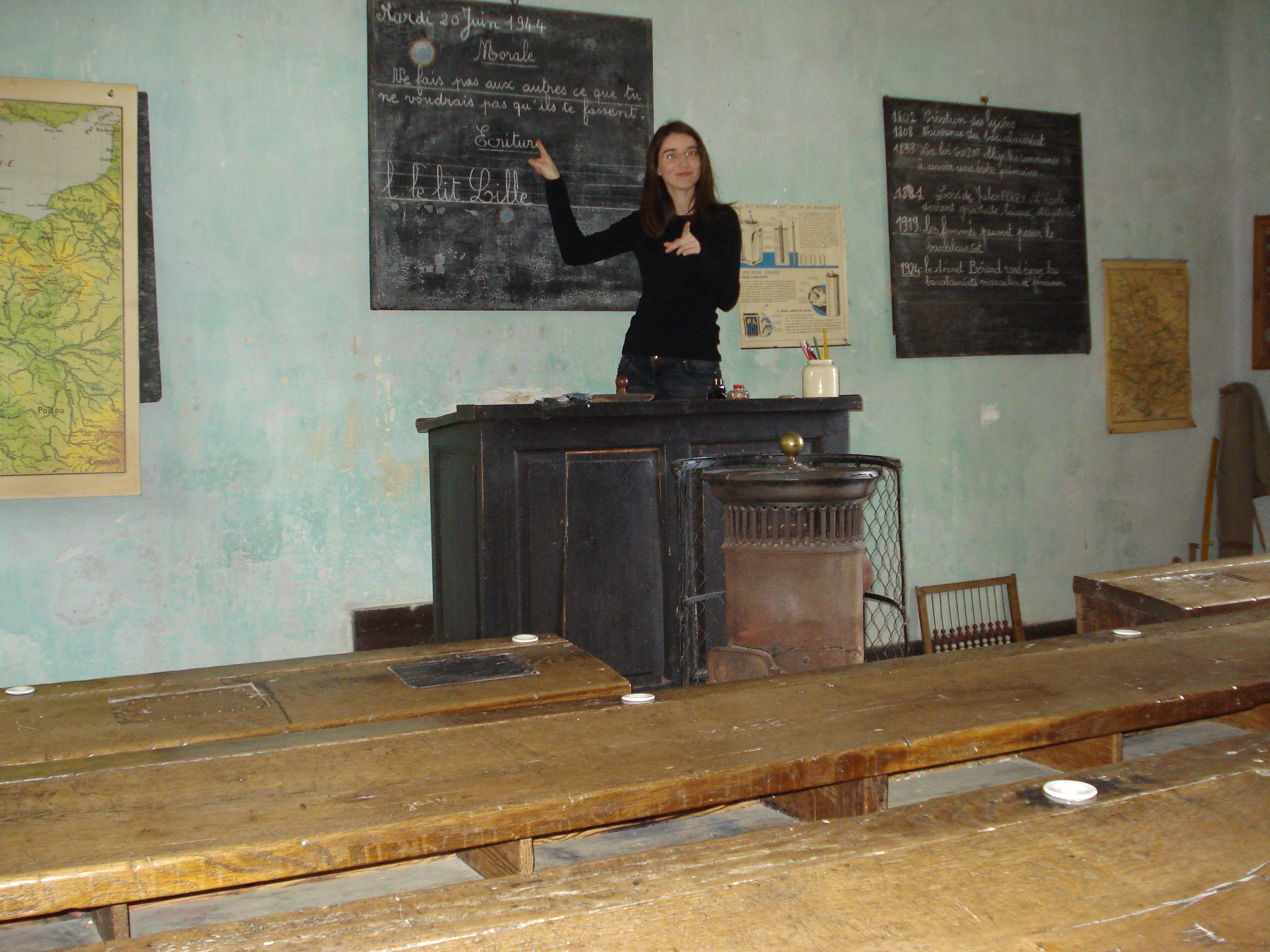 Lernejo muzeo